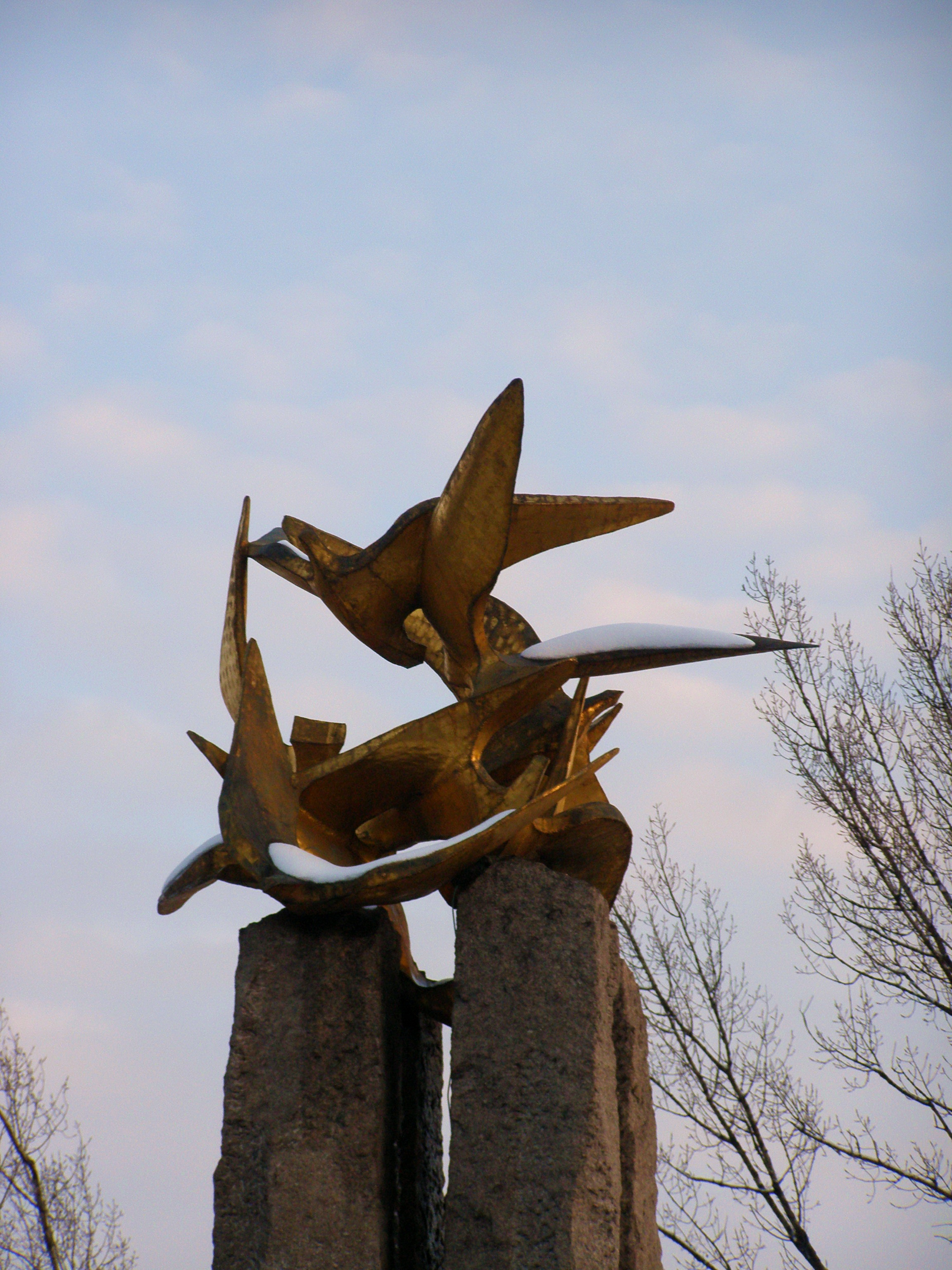 Frýdek, Památník osvobození